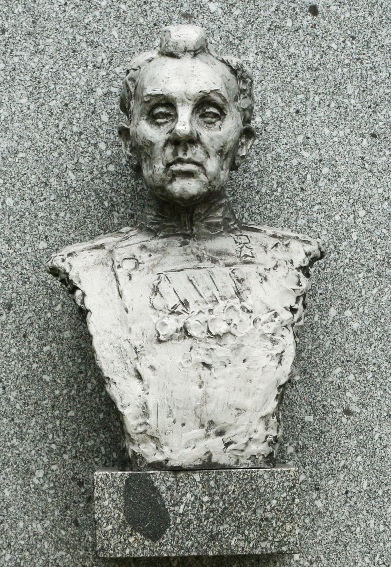 Dukla, Alej hrdinov maršál sovietského zväzu Kiril Semionovič Moskalenko